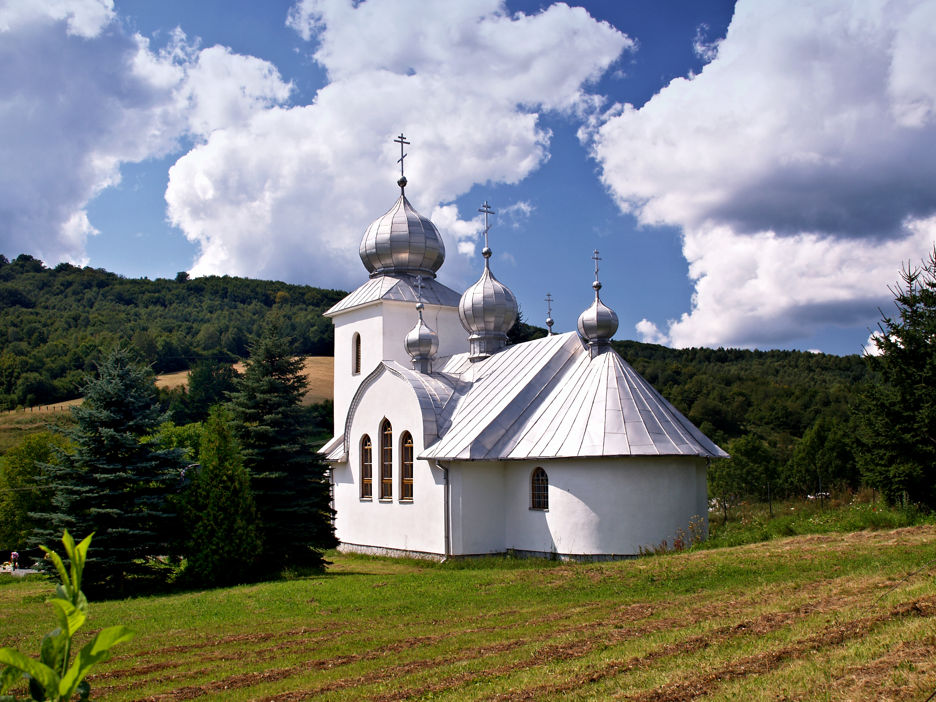 Rokytovce cerkiew (District de Medzilaborce - Prešovský kraj) - Église de rite orthodoxe russe